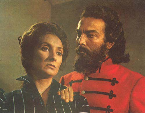 Fotografía color sobre papel brillante. Escena de la película "Güemes, la tierra en armas" dirigida por Leopoldo Torre Nilsson, donde se muestra a los actores Norma Aleandro y Alfredo Alcón. A la izquierda la actriz de tres cuartos perfil derecho, mirando al frente, con cabello recogido y blusa color azul con rayas blancas de cuello levantado. A la derecha el actor Alfredo Alcón de tres cuartos perfil izquierdo, con barba y cabello largo, vistiendo uniforme militar colorado.